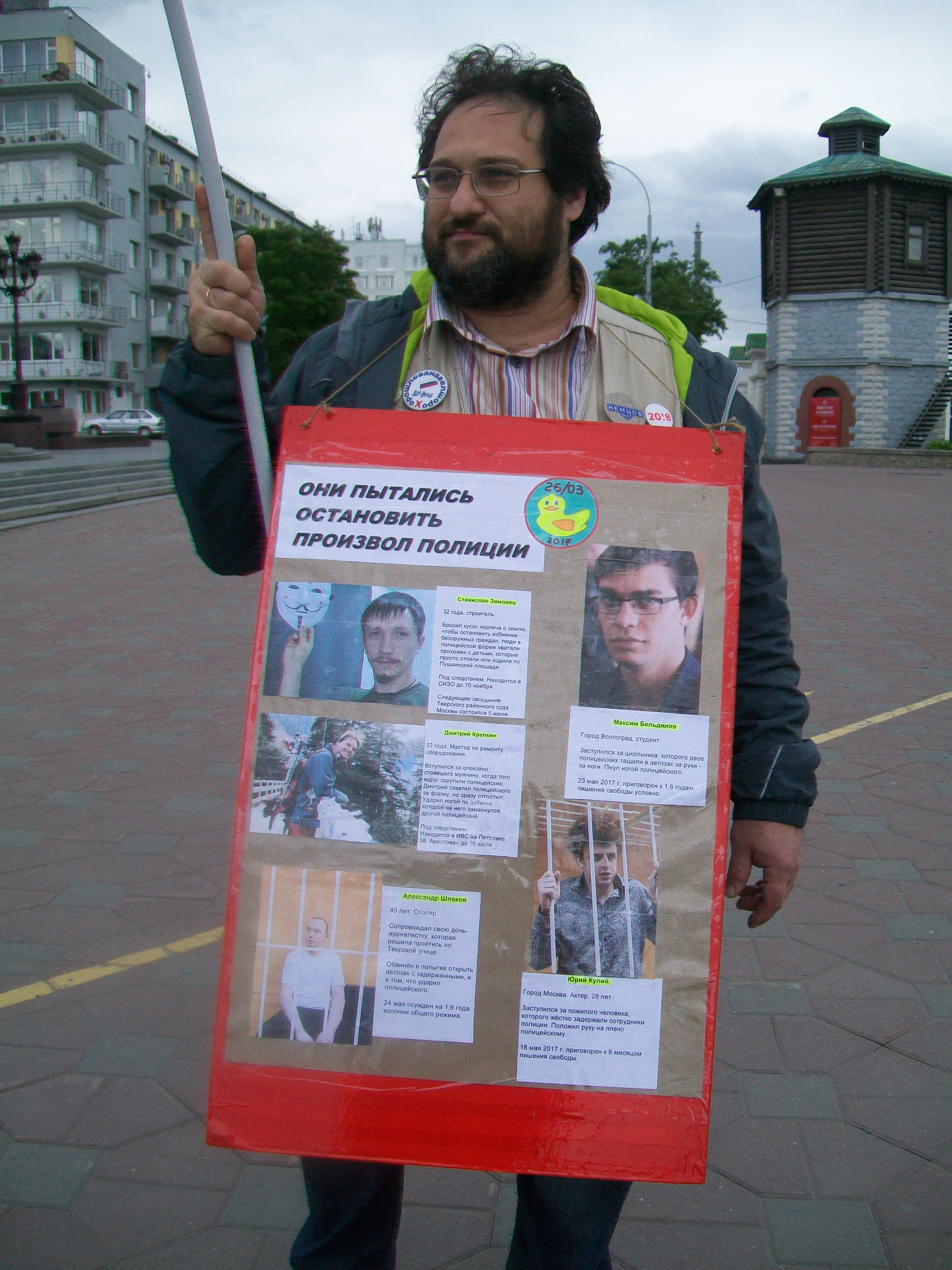 Пикетчик с портретами осужденных в связи с митингами 26 марта 2017 года. Пикет в Екатеринбурге 6 июня 2017 года